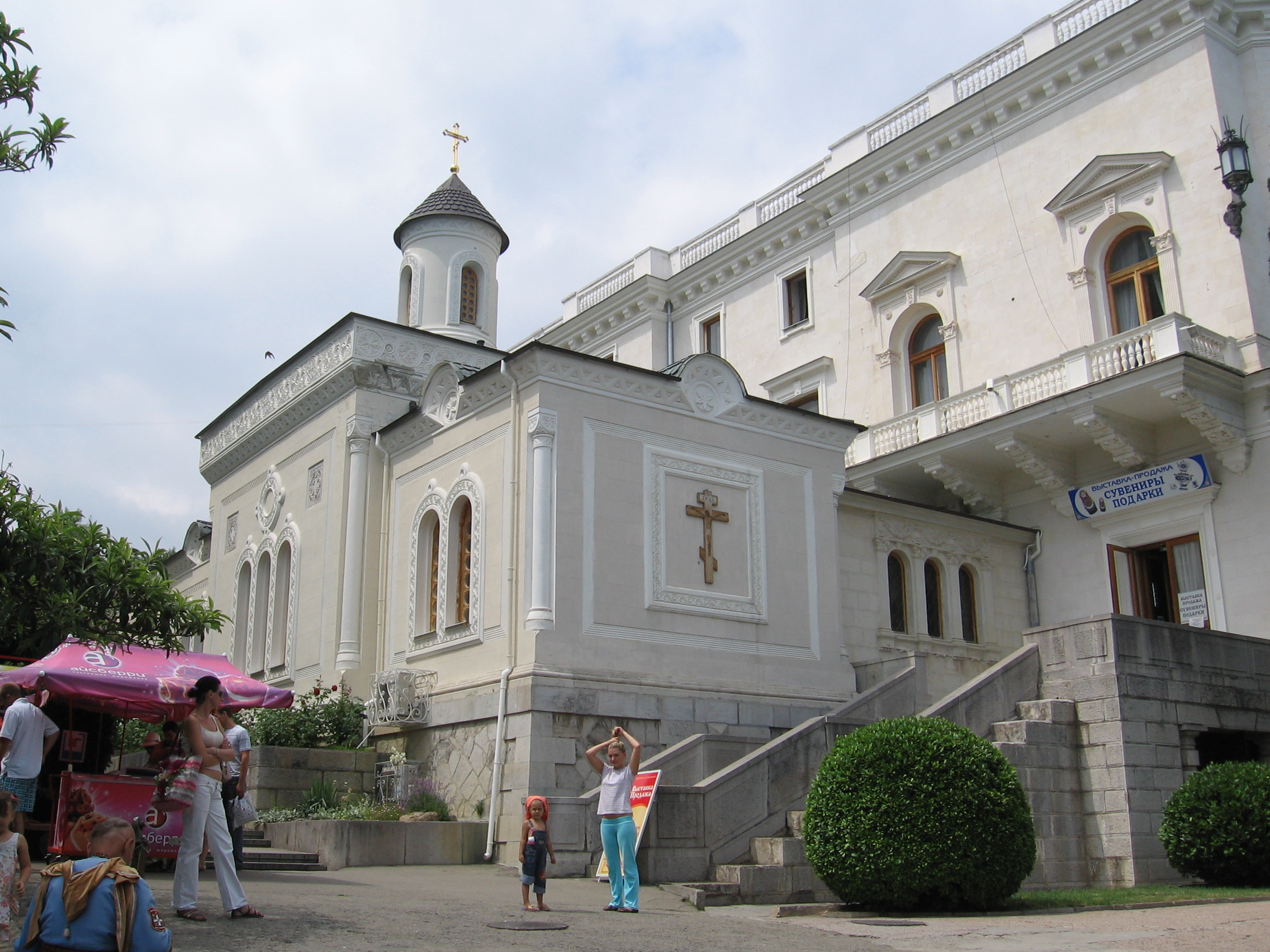 Фото